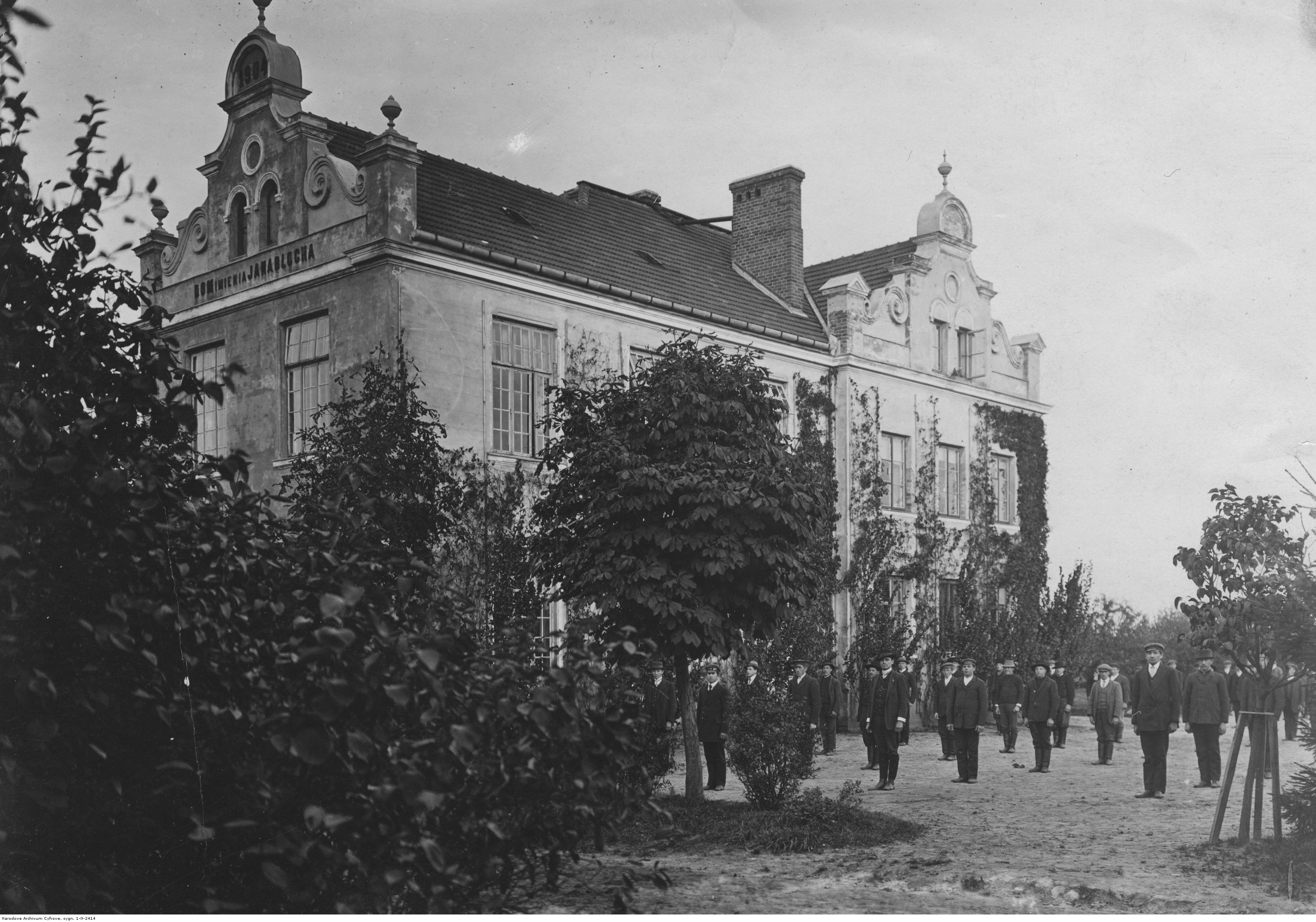 Ludowa Szkoła Rolnicza w Pszczelinie (Brwinowie). Widok zewnętrzny gmachu szkolnego im. Jana Blocha.